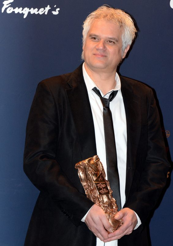 Fabrice Luang-Vija, cérémonie des César